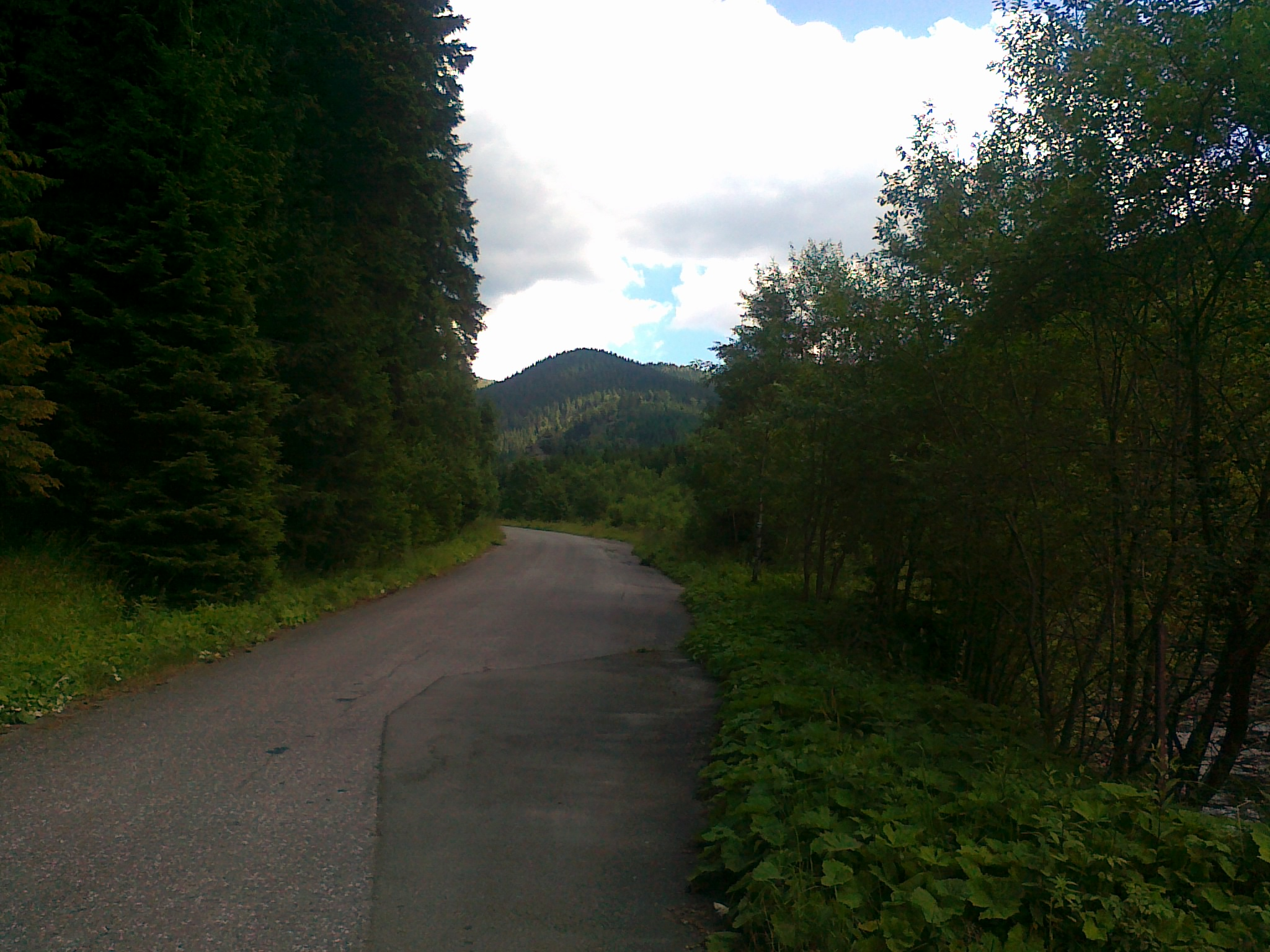 Widok na górę Zámčisko-S